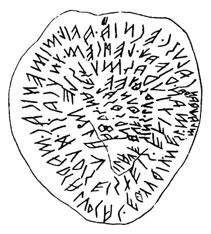 "Piombo di Magliano - Iscrizione B"